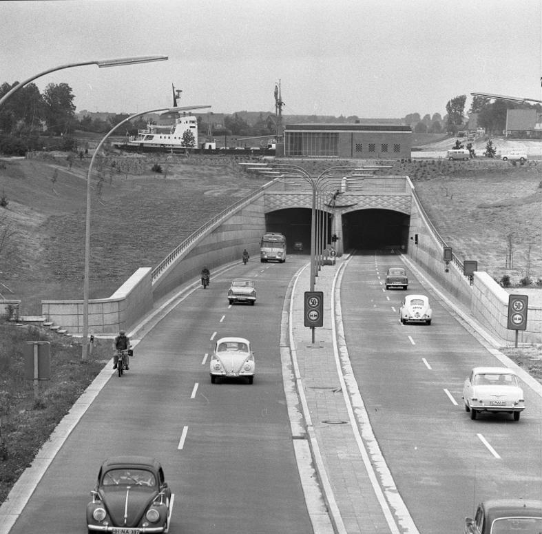 Kieler Woche 1962 Kanaltunnel bei Rendsburg 21.-22.6.1962